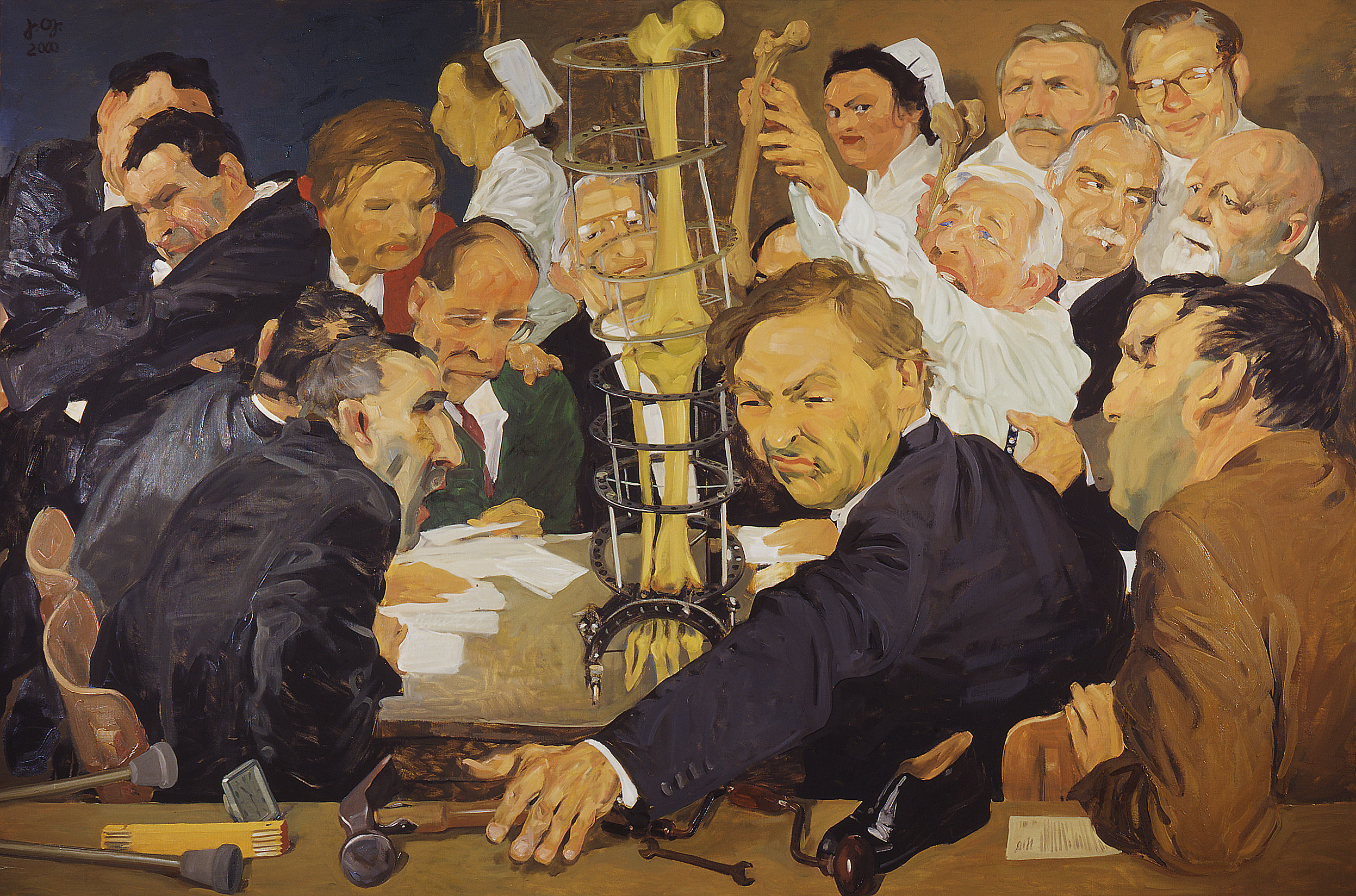 Ausschnitt aus dem Wandbild im Hörsaal des Berufsgenossenschaftlichen Unfallkrankenhauses Hamburg: „Aus der Geschichte der Unfallchirurgie“. Dargestellt sind die Unfallchirurgen Walther Zimmer (hinter der Fixateurmontage), Werner Arens (im Kittel), Botho Schröder (mit Zigarette), Lorenz Böhler (rechts mit weißem Kinnbart), Dieter Buck-Gramcko (oben rechts), neben ihm Ludwig Rehn.